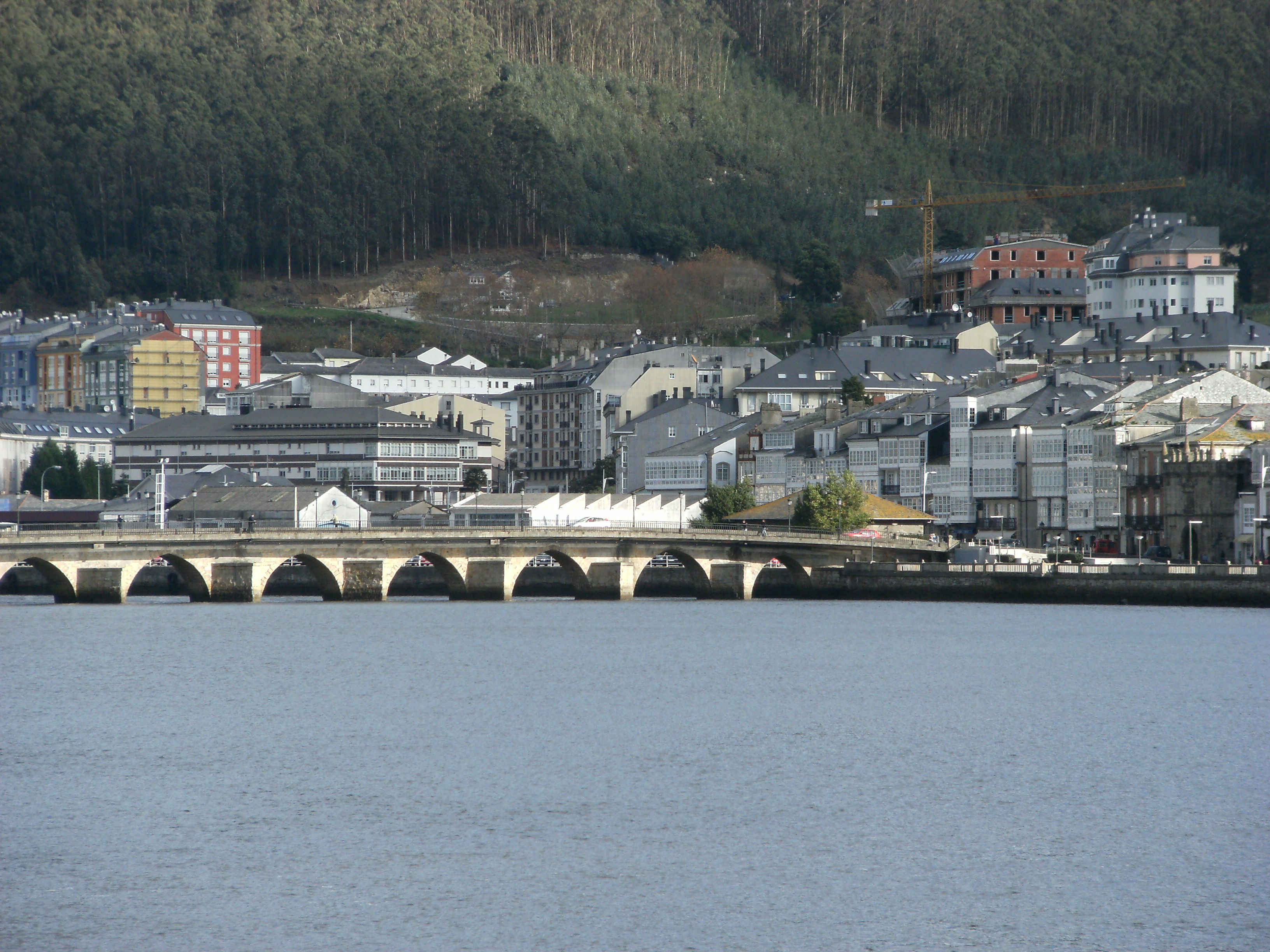 A ponte da Misericordia é unha construción sobre a ría de Viveiro, entre a Porta de Carlos V e a capela da Misericordia, da que recibe o nome. A actual ponte foi edificada no século XV, durante o reinado de Henrique IV de Castela[1], no lugar doutra ponte construída durante a dominación romana A construción do século XV tiña doce arcos, de medio punto os dos extremos, e oxivais os dez do medio, para dar convexidade á calzada. Deses doce arcos consérvanse na actualidade nove, xa que houbo diversas transformacións posteriores para adaptar a ponte ás novas necesidades.